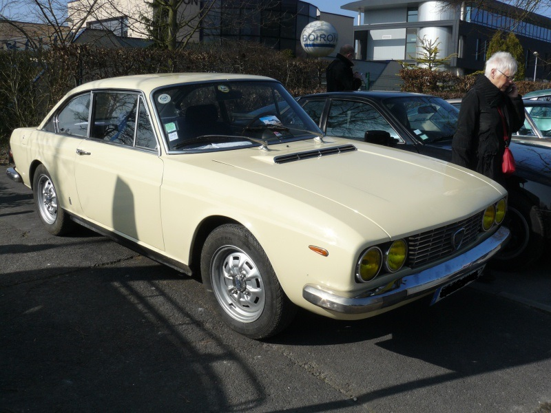 Reims 2014